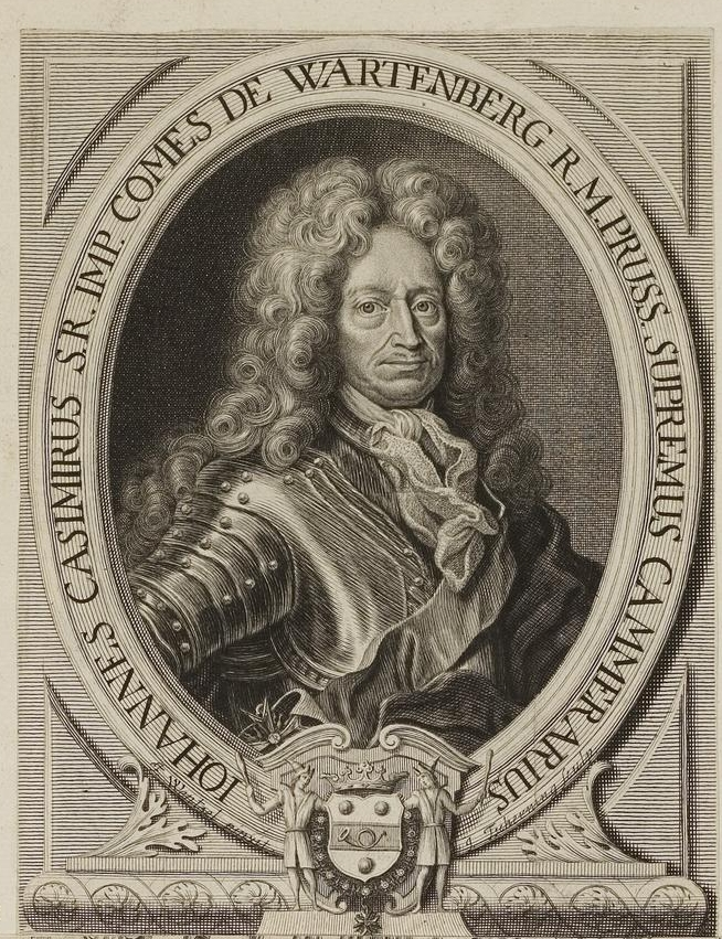 Johann Casimir Kolbe von Wartenberg (1643-1712)